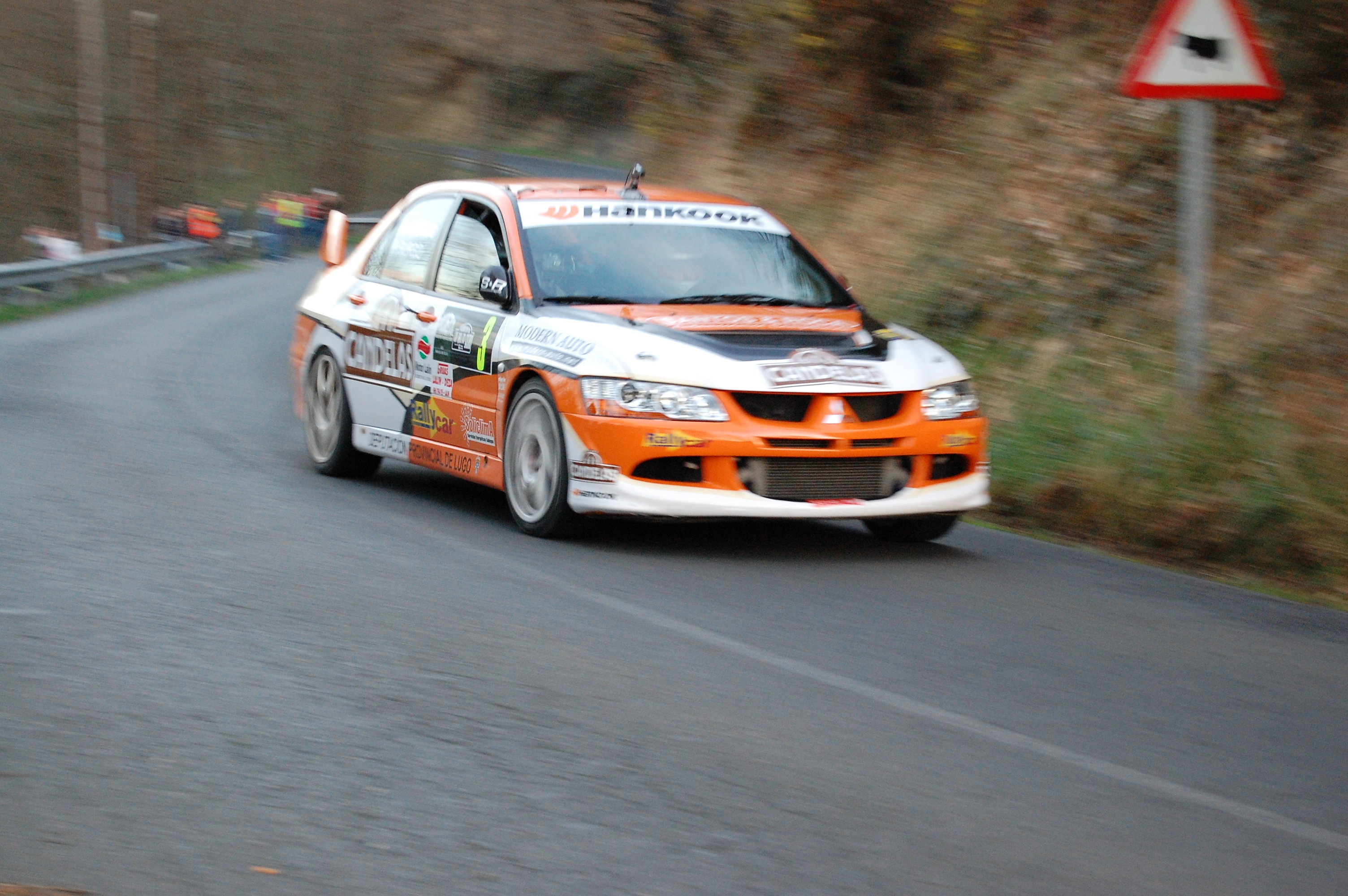 Pedro Burgo. Spanish rallye drivers